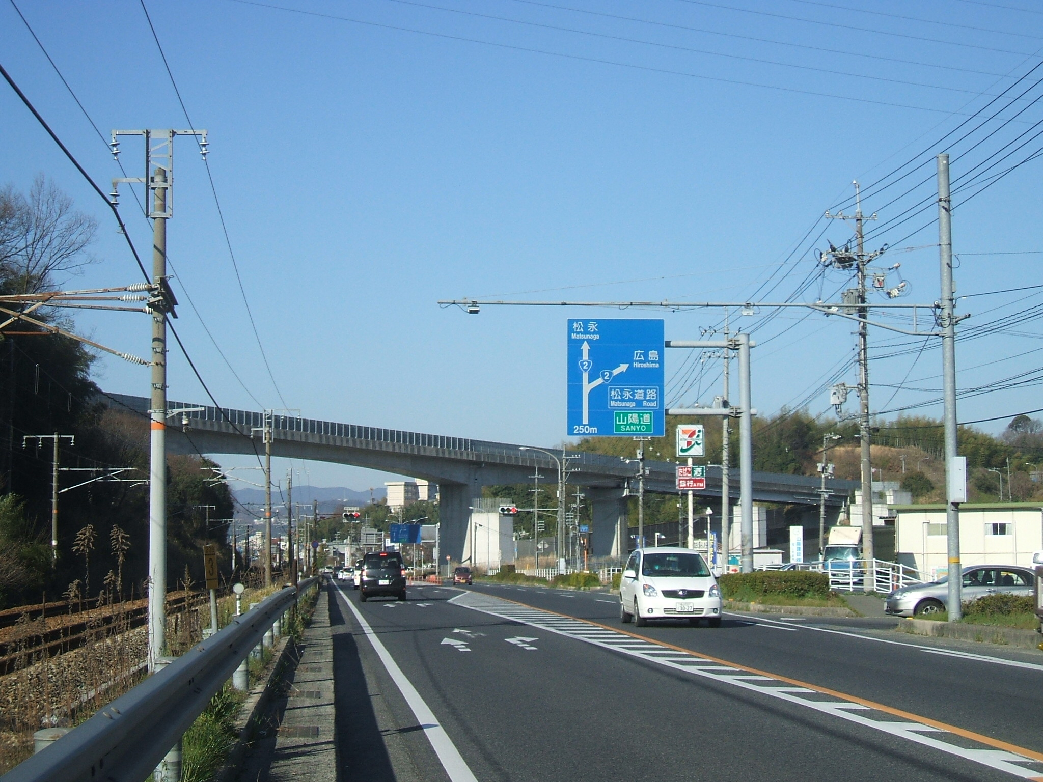 広島県福山市にある赤坂バイパス神村ランプを東側より撮影